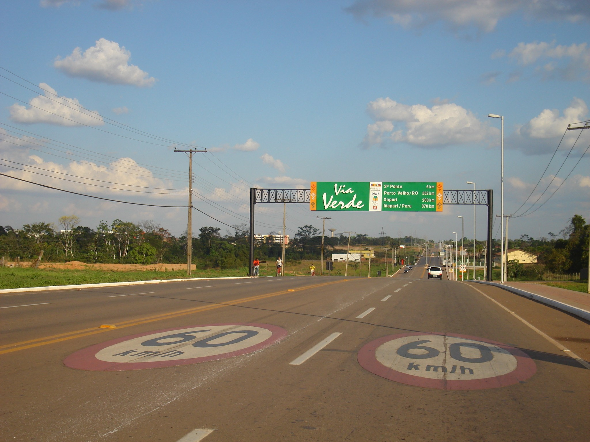 Via conhecida como Via Verde em Rio Branco, Acre, Brasil. Fonte Autor: Filipe Mesquita de Oliveira --Filipe Mesquita discuta30px 05:47, 18 Julho 2006 (UTC)